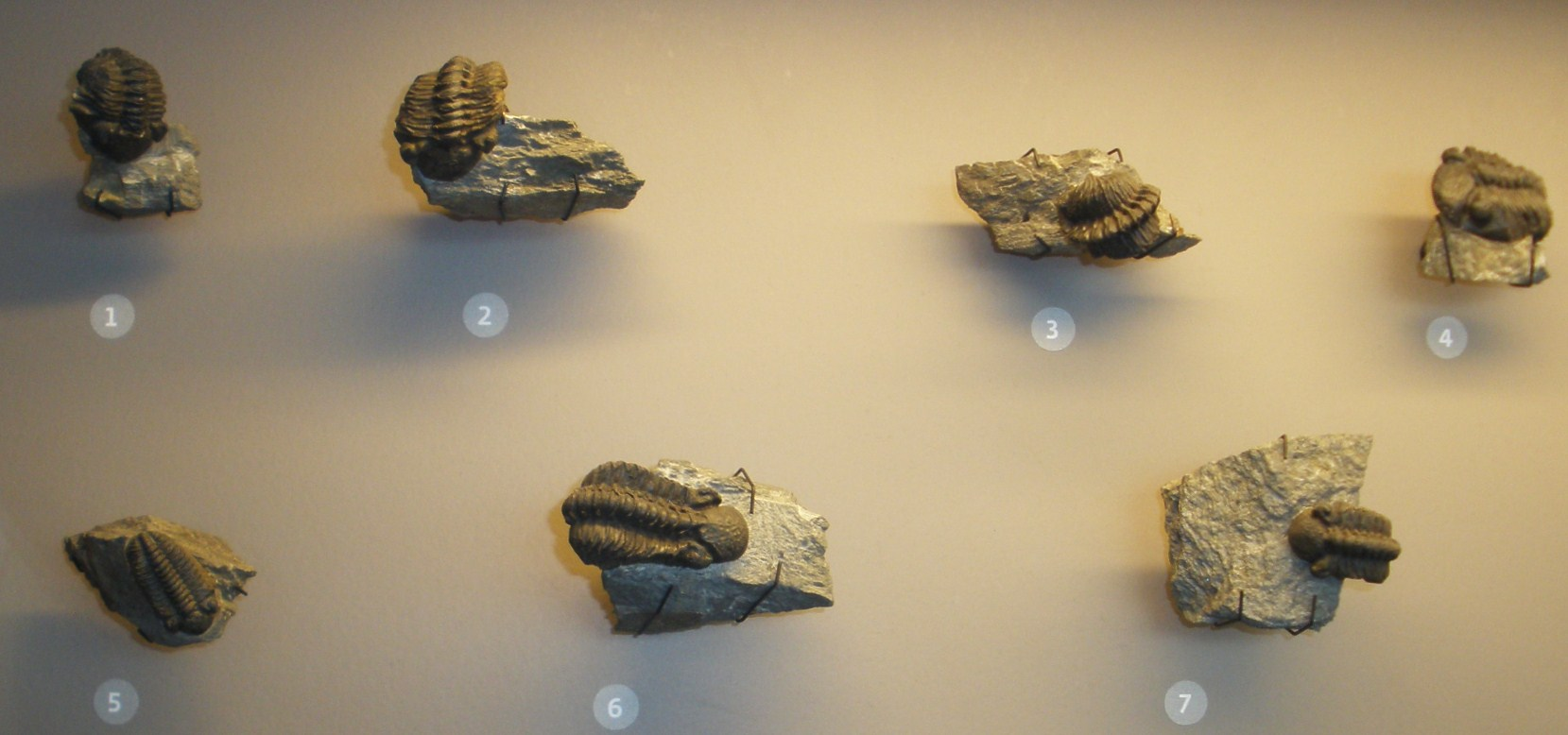 Fossil of Geesops, a trilobite Took the photo at Musee d'Histoire Naturelle, Brussels